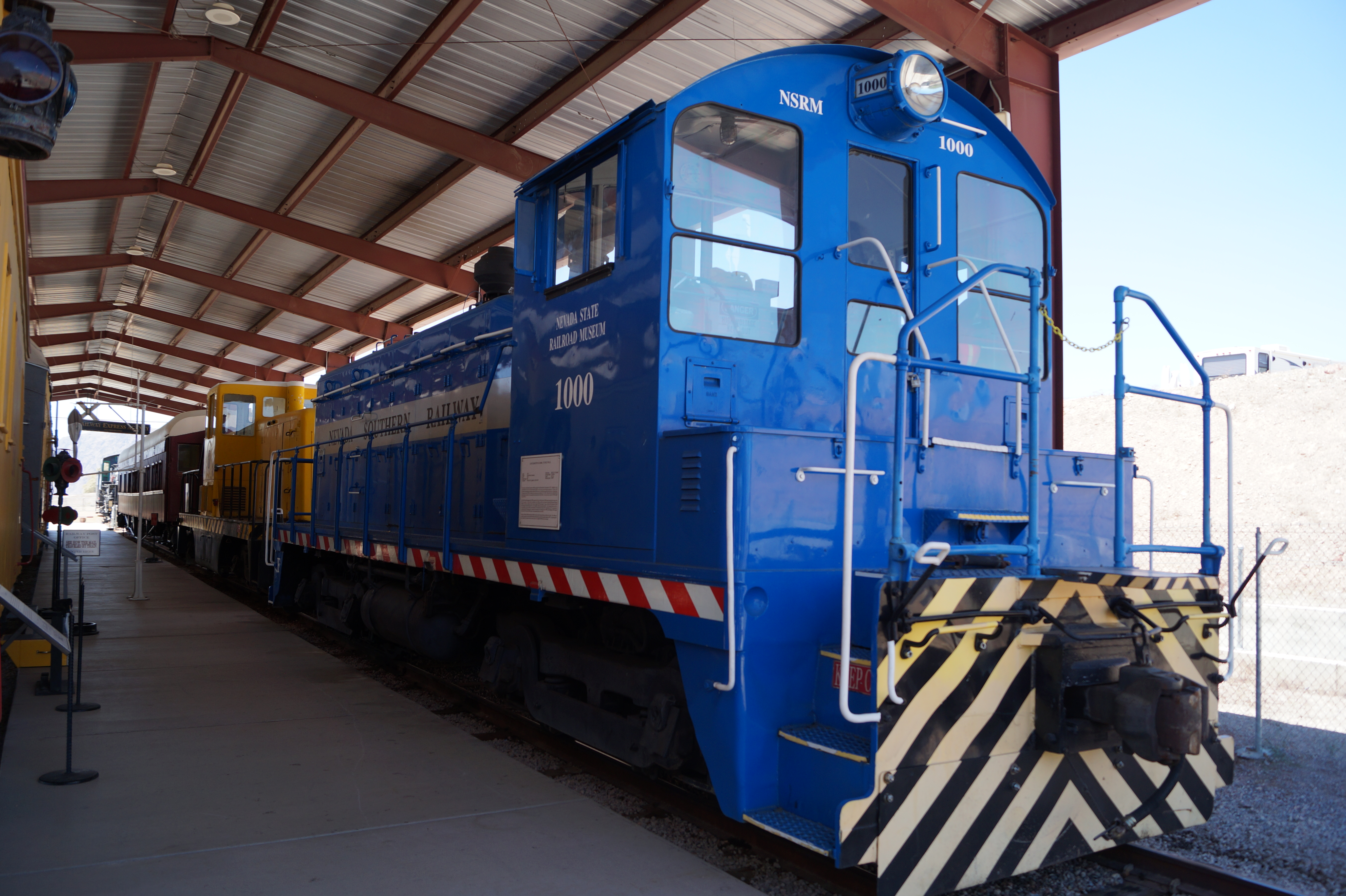 The Nevada State Railroad Museum which is an agency of the Nevada Department of Cultural Affairs. It is located at Yucca Street on the tracks of the historic Union Pacific Railroad branch Henderson-Boulder City near the former Boulder City Railroad Yards where the Hoover Dam construction equipment was unloaded in the 1930s.